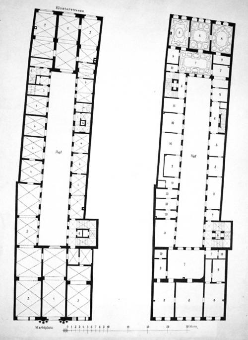 Grundrisse von Äckerleins Hof in Leipzig